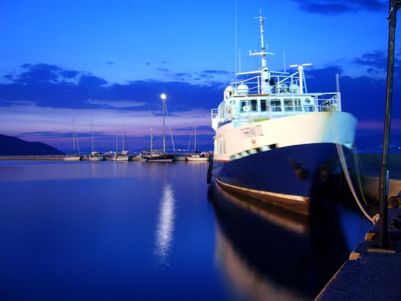 Thassos / Tasos / Θάσος / Тасос